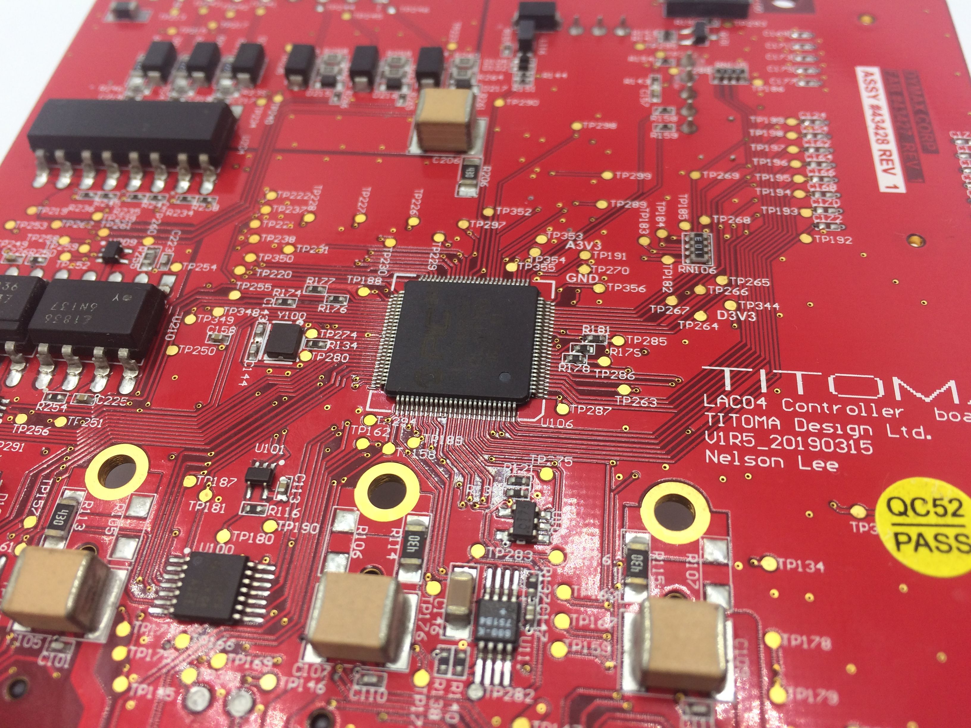 Circuit imprimé conçu autour d'un microcontrôleur SMT32.